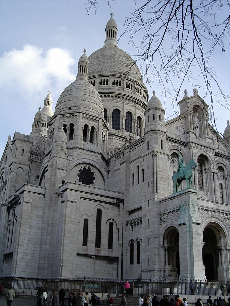 L'église du Sacré Cœur à Montmartre (Paris)